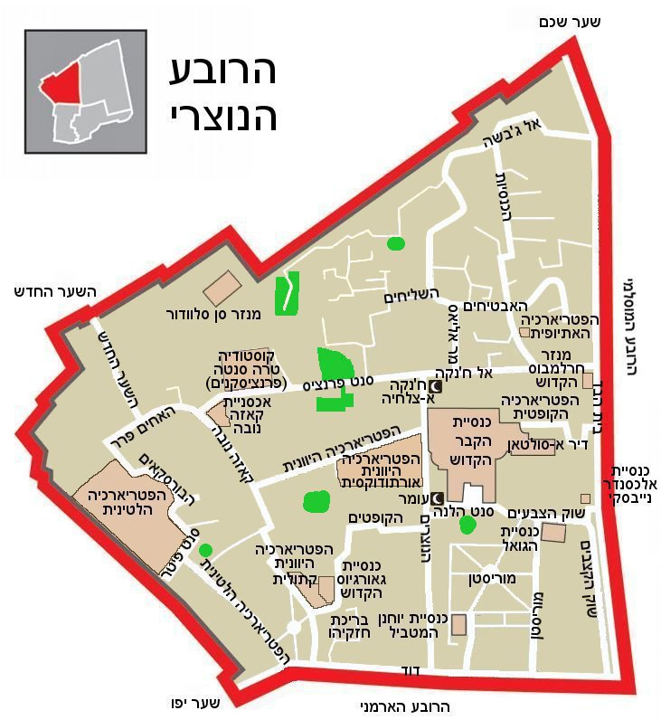 הרובע הנוצרי